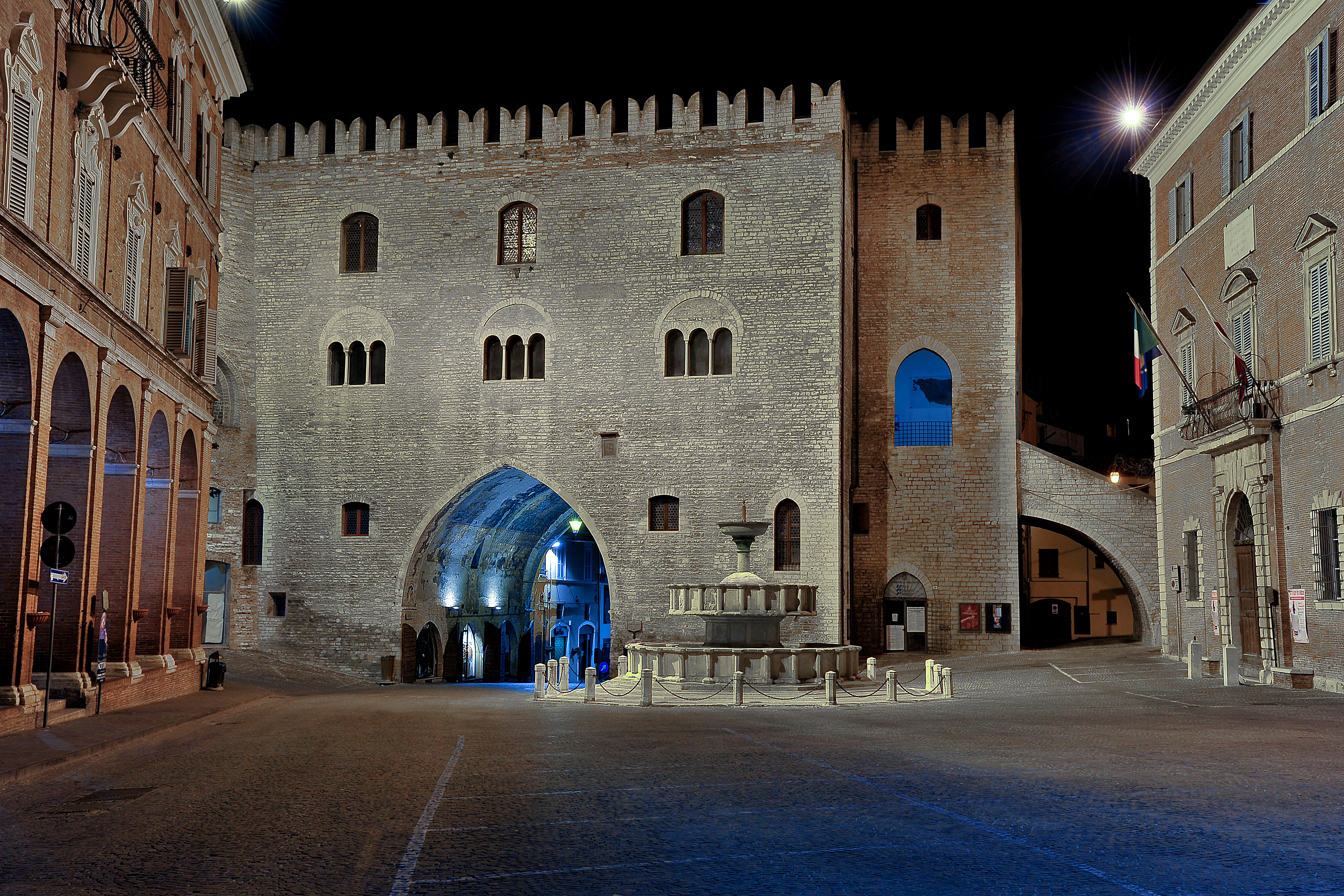 Palazzo del Podestà (Fabriano) This is a photo of a monument which is part of cultural heritage of Italy.